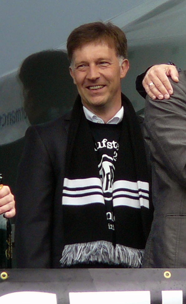 Oberbürgermeister Martin Gerlach bei der Aufstiegsfeier des VfR Aalen am 5. Mai 2012